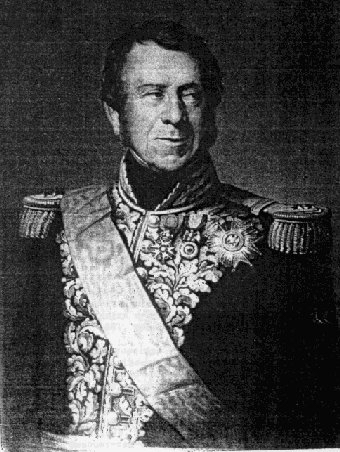 document photo representant Napoleon Hector Soult de Dalmatie